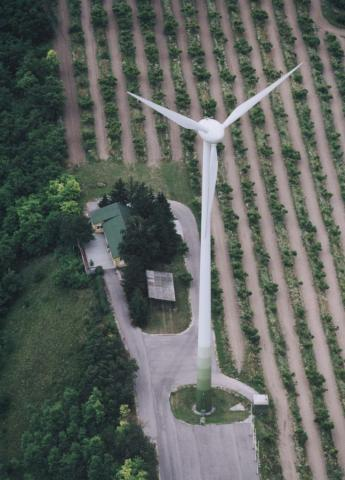 Kulcs, hungary, aerialphotography